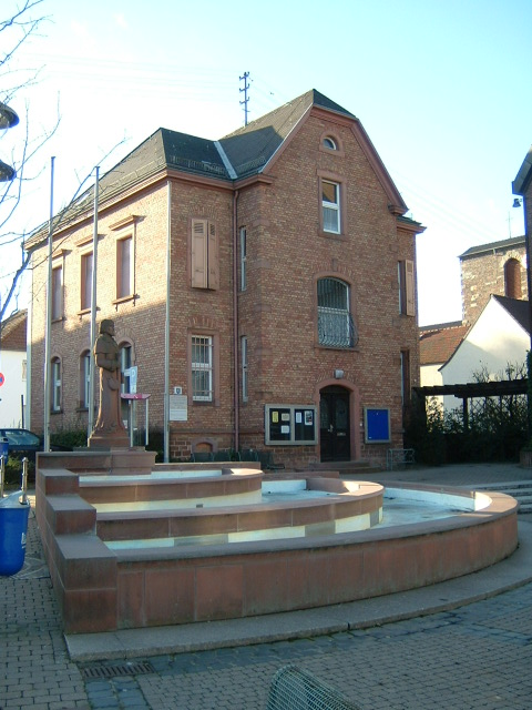 Harheim, borrough of Frankfort. Ortsmitte, Platz mit Brunnen und Bürgerhaus.